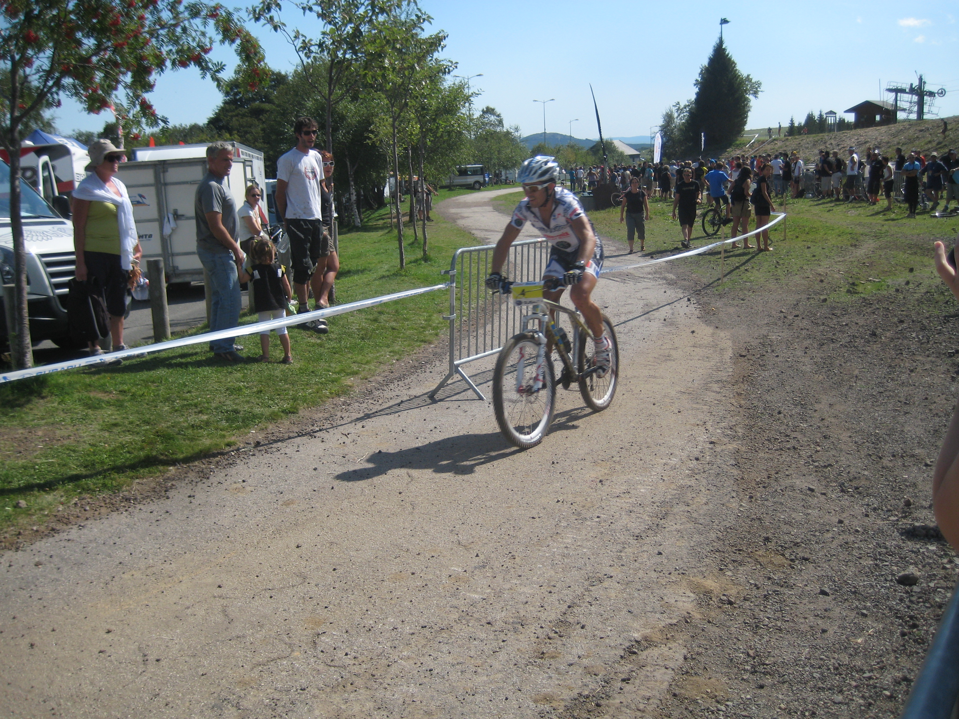 Cédric Ravanel lors de la Coupe de France de VTT 2011